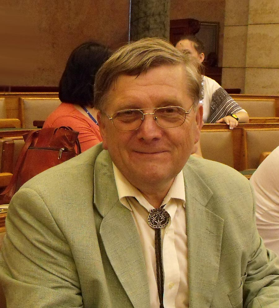 Dr. Széman Péter